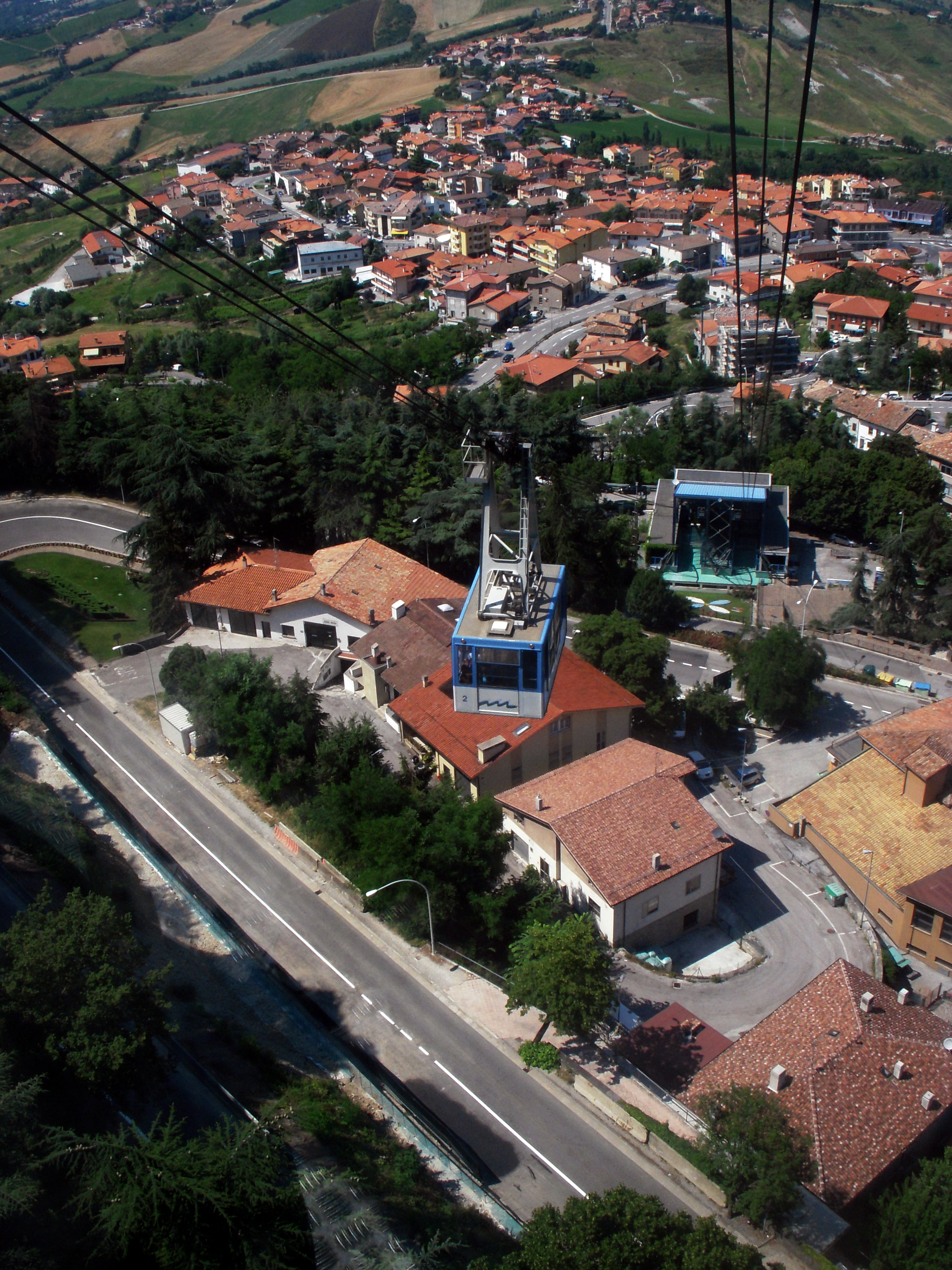 Svævebanekabinen tæt på nederste station, juni 2010.